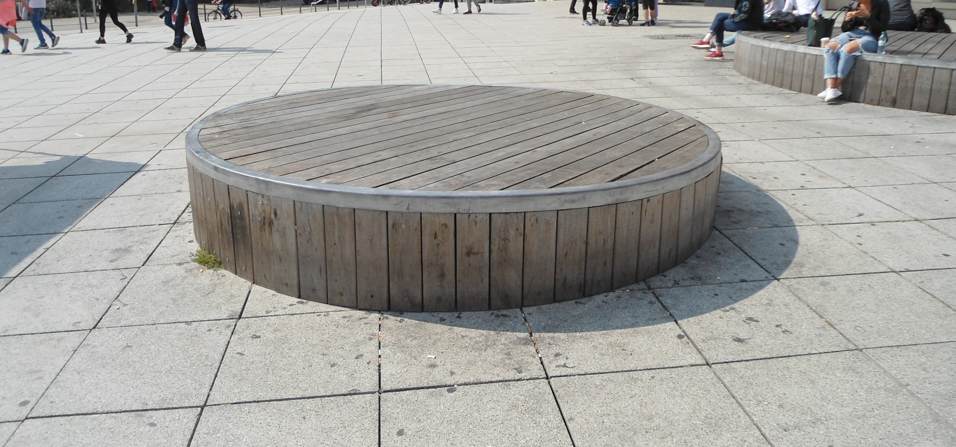 "Karli", Sitzskulptur von Alexander Karle in Saarbrücken